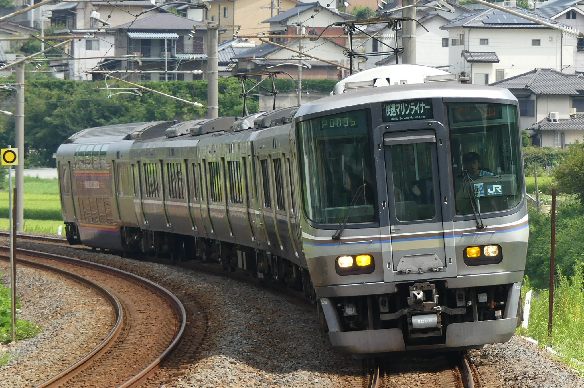 快速マリンライナー